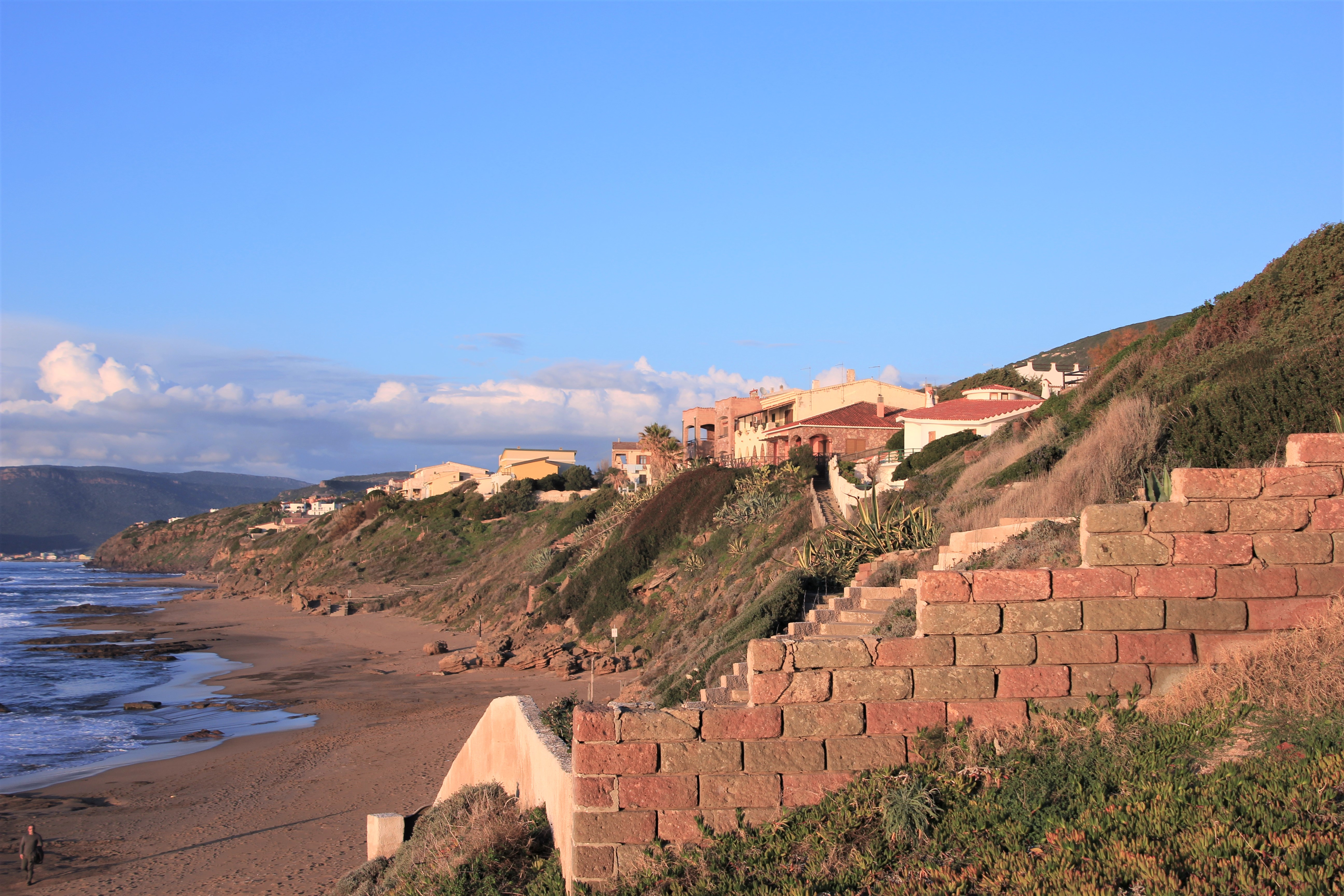 Tresnuraghes, Porto Alabe